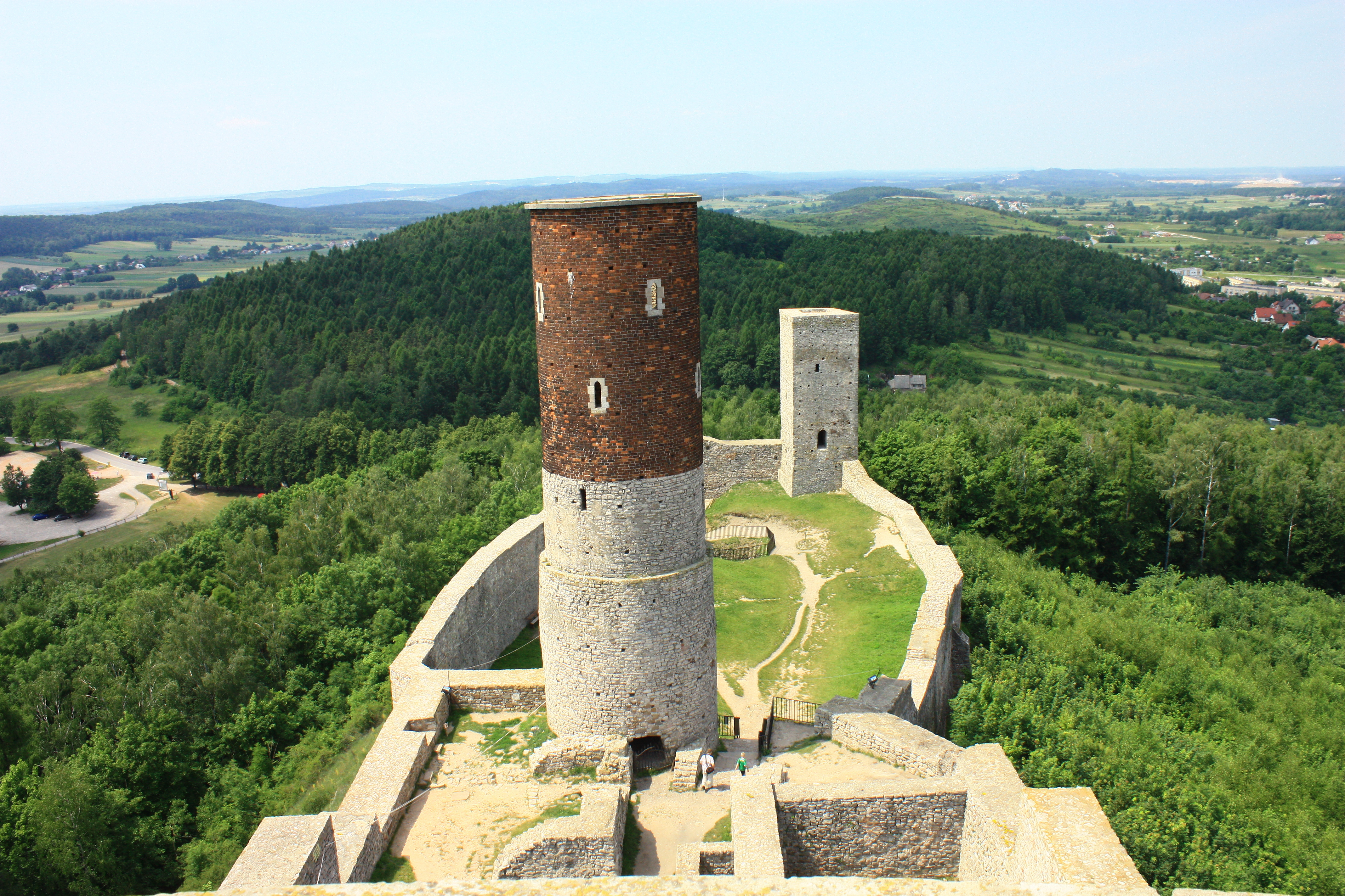 Chęciny, ruiny zamku, XIII/XIV, XVI w.